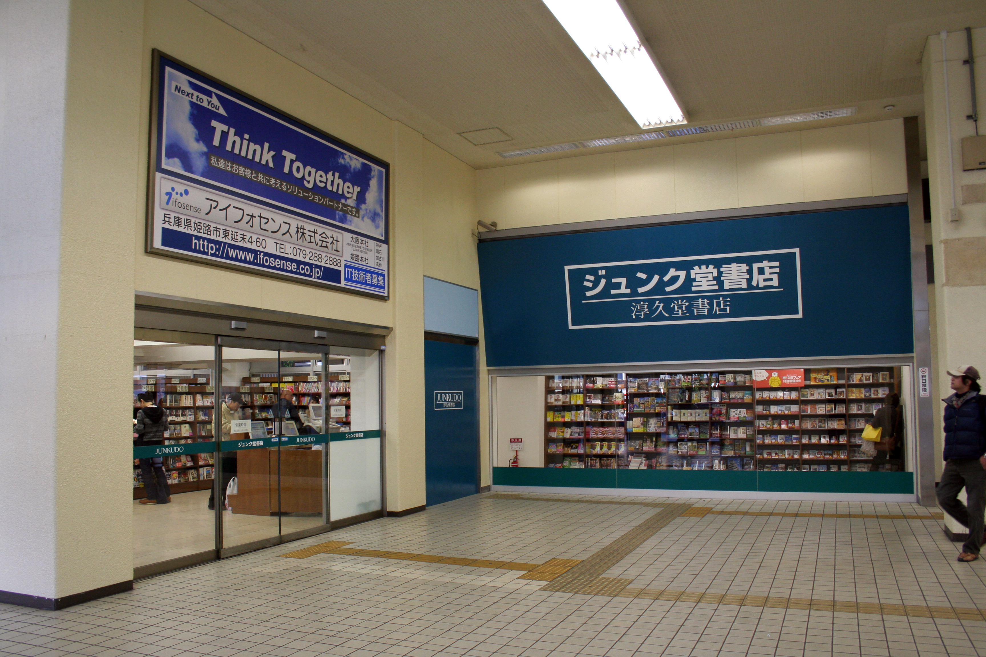 兵庫県南西部にある店舗など。 JR姫路駅北側出入り口方面にあるジュンク堂姫路駅前店。